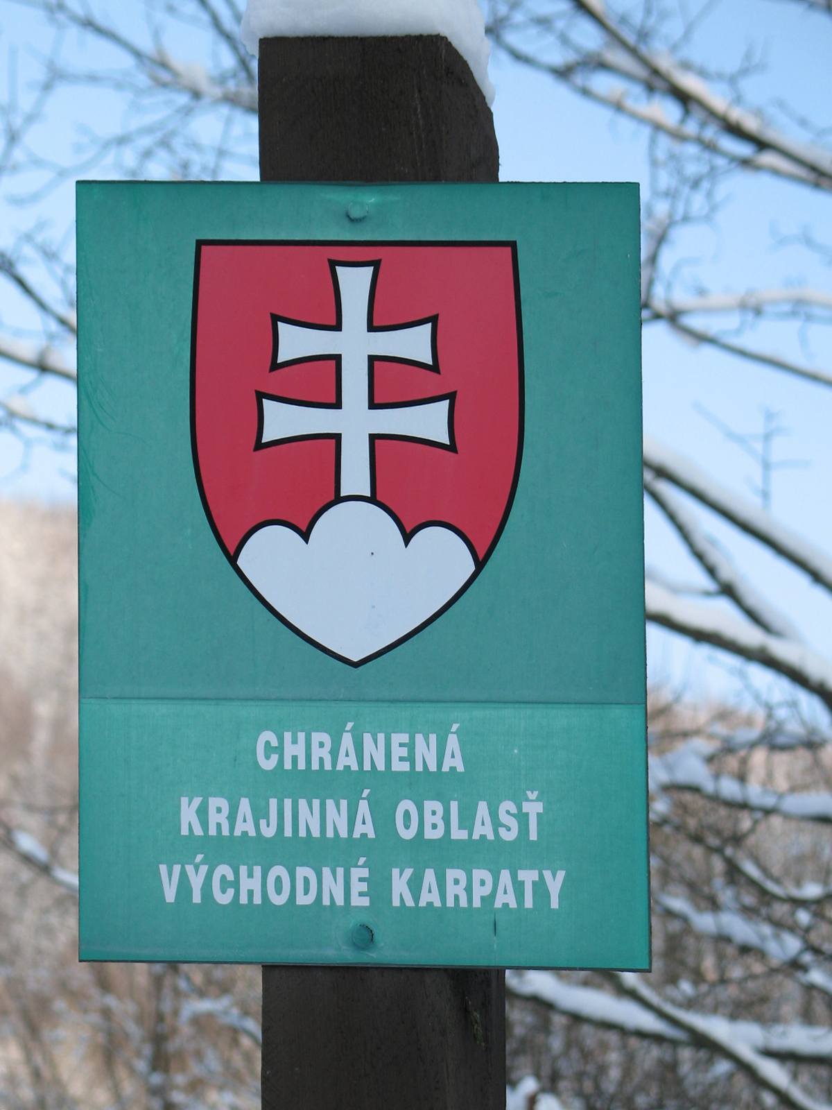 Tabuľa vymedzujúca priestor chránenej krajinnej oblasti Východné Karpaty